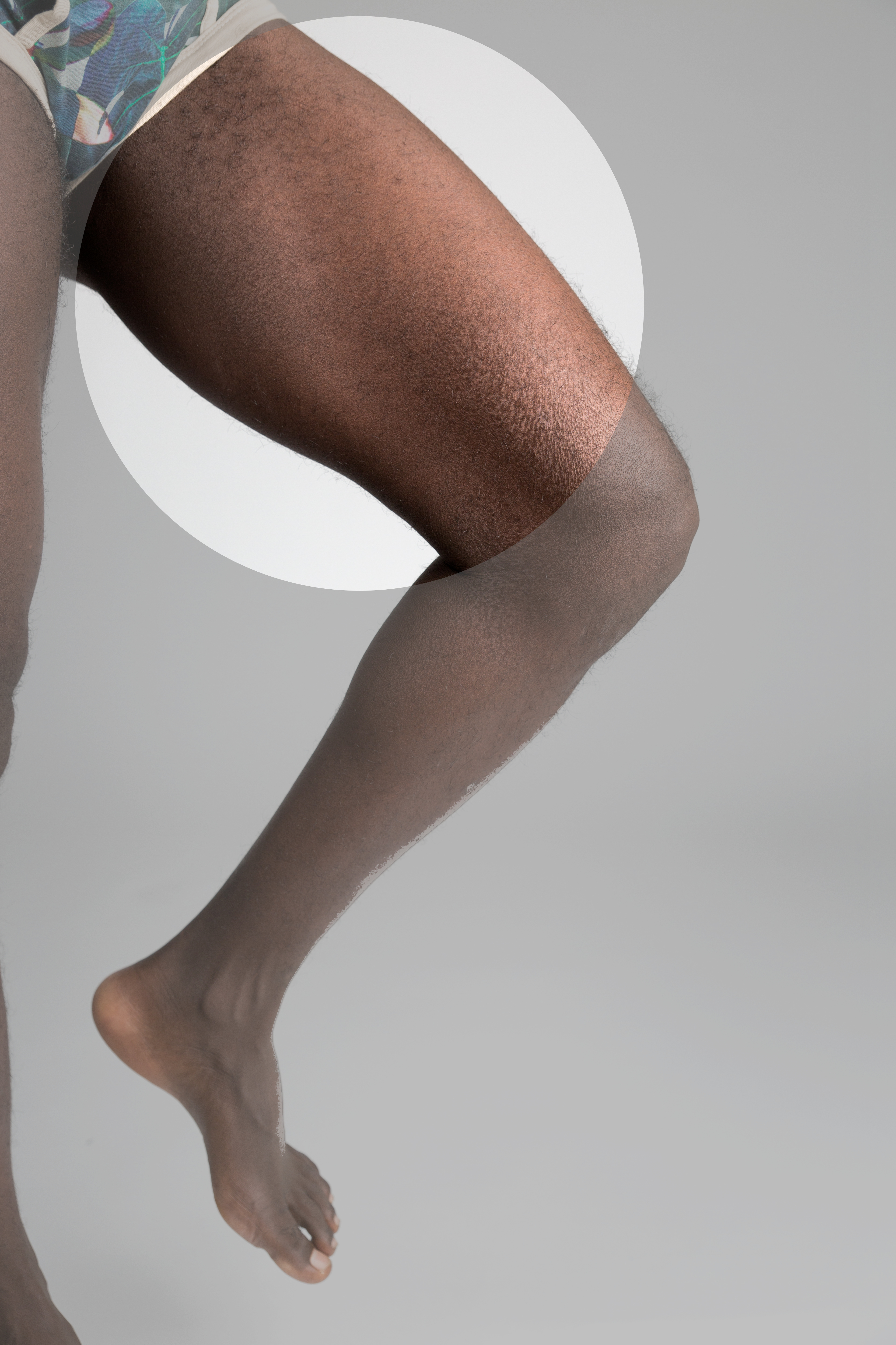 Homa femuro